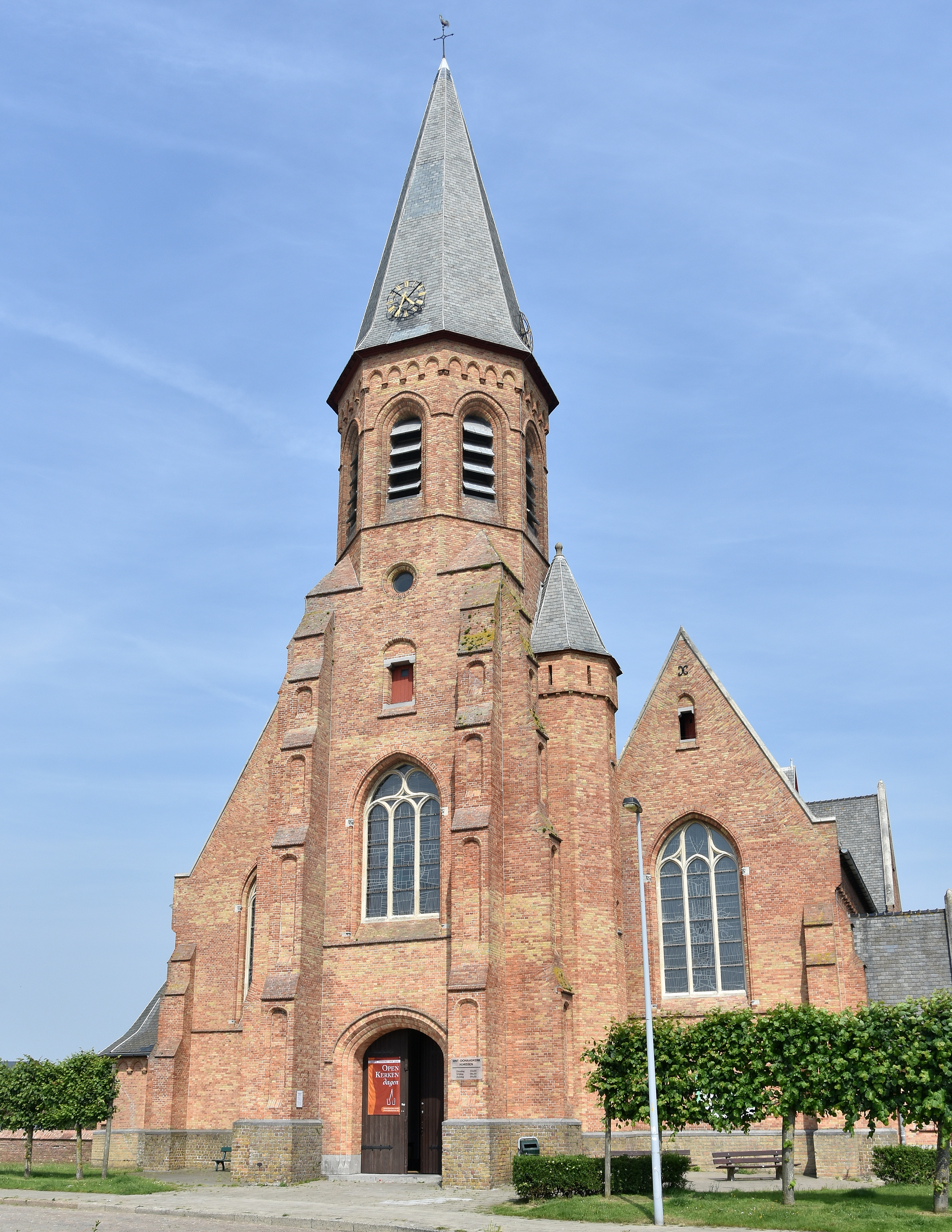 Sint-Donatuskerk (Zeebrugge) 25-06-2019 16-34-21